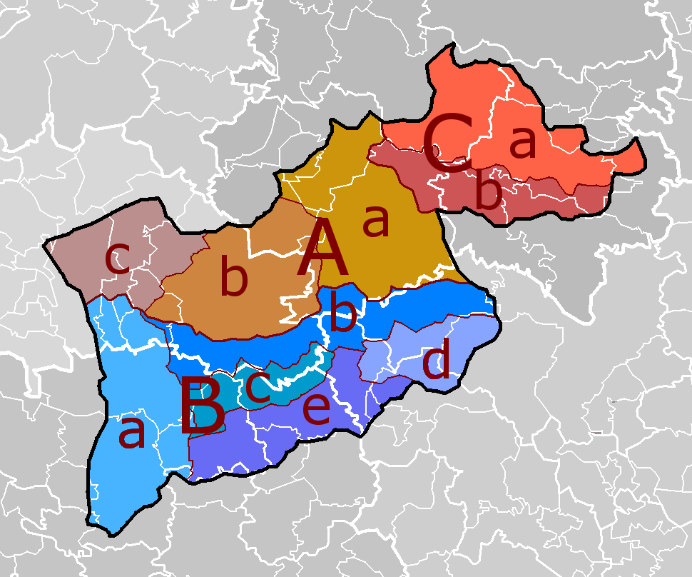 Poloha a členění geomorfologického celku Tepelská vrchovina na podkladové mapě územněsprávního členění pomezí okresů Karlovy Vary, Cheb, Tachov a Plzeň-sever. Hercynský systém Hercynská pohoří I Česká vysočina I3 (V) Krušnohorská subprovincie I3C (IIIC) Karlovarská vrchovina I3C-2 (IIIC2) Tepelská vrchovina (Tepler Hochland) I3C-2-A (IIIC2-A) Toužimská plošina (Theusinger Hochland) I3C-2-A-a (IIIC2-A-a) Útvinská plošina I3C-2-A-b (IIIC2-A-b) Mrázovská pahorkatina I3C-2-A-c (IIIC2-A-c) Mariánskolázeňská vrchovina I3C-2-B (IIIC2-B) Bezdružická vrchovina (Weseritzer Bergland) I3C-2-B-a (IIIC2-B-a) Michalohorská vrchovina I3C-2-B-b (IIIC2-B-b) Vidžínská vrchovina I3C-2-B-c (IIIC2-B-c) Hanovská pahorkatina I3C-2-B-d (IIIC2-B-d) Trhomenská vrchovina I3C-2-B-e (IIIC2-B-e) Krasíkovská vrchovina I3C-2-C (IIIC2-C) Žlutická vrchovina (Luditzer Bergland) I3C-2-C-a (IIIC2-C-a) Bochovská vrchovina I3C-2-C-b (IIIC2-C-b) Vladařská vrchovina